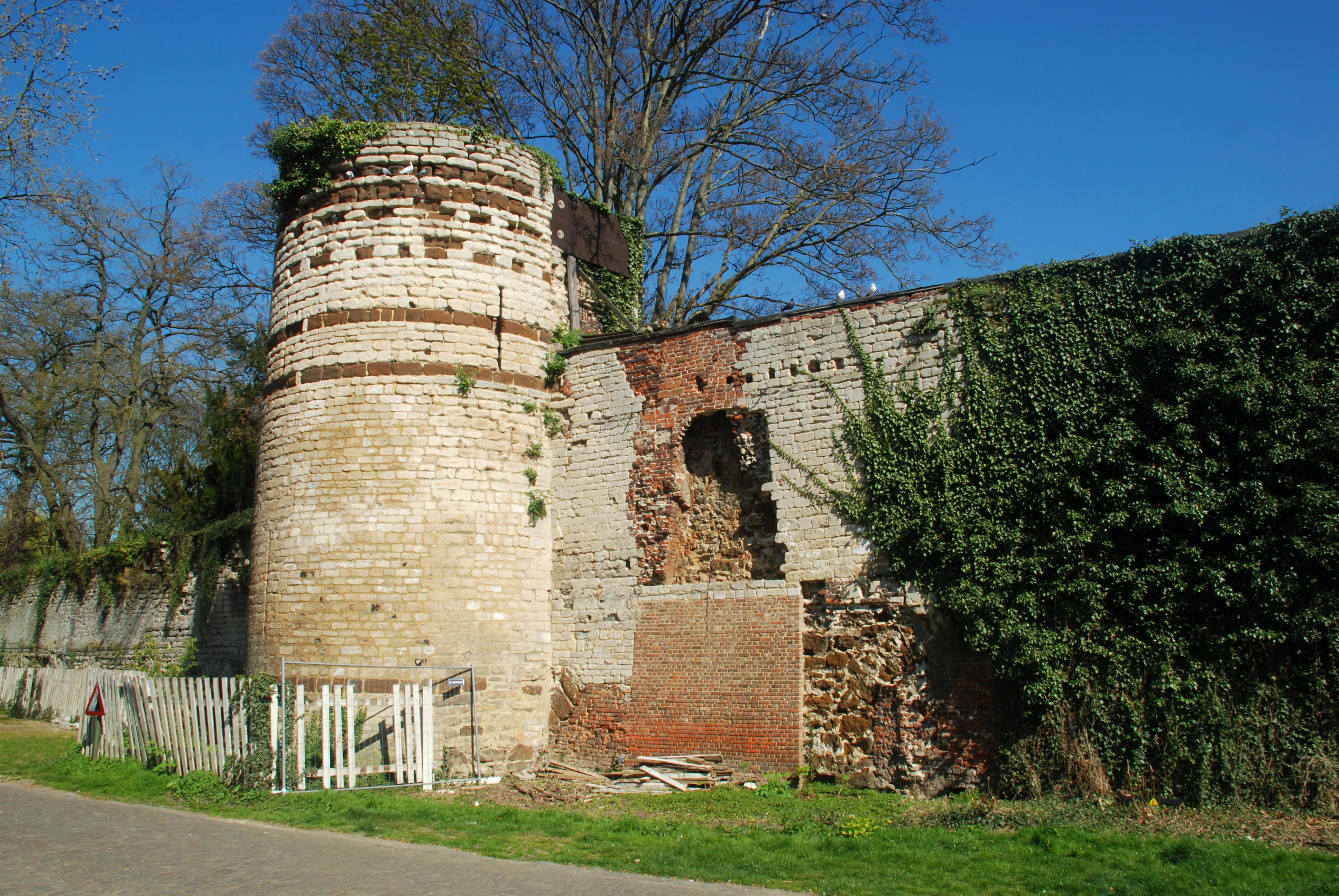 Belgique - Brabant flamand - Louvain - Première enceinte de Louvain - Handbooghof